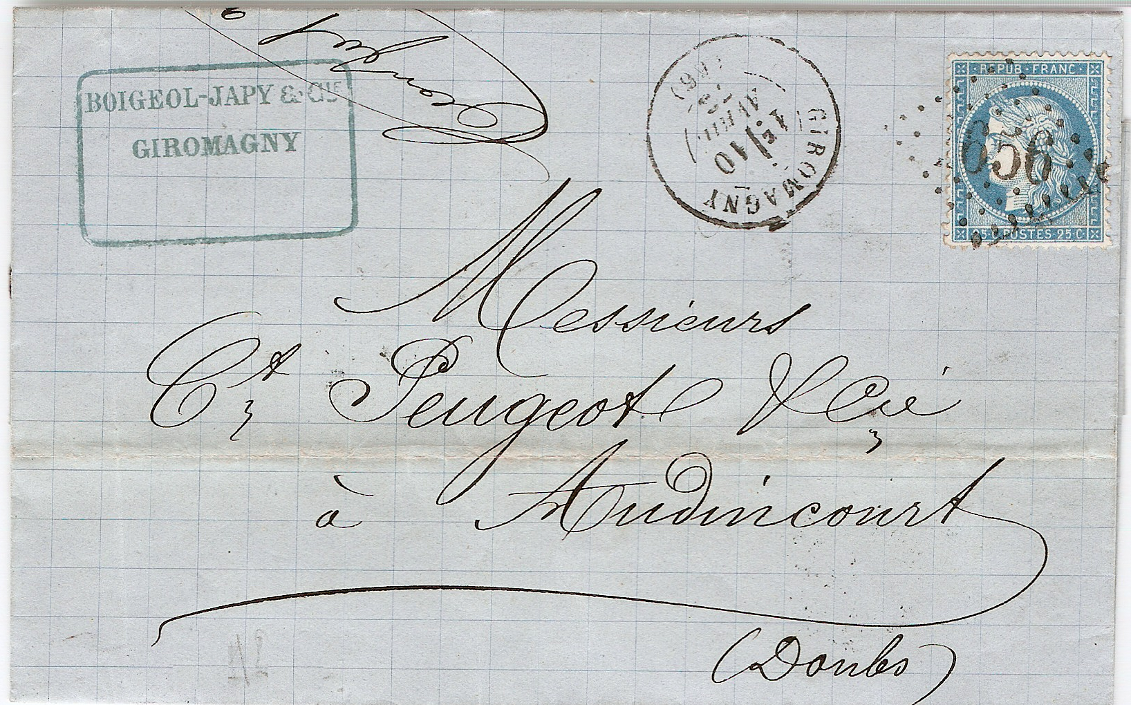 Lettre de France (Giromagny) de 1873 affranchie avec un 25 c Cérès bleu de 1871 et oblitérée par un cachet Gros Chiffres 1656